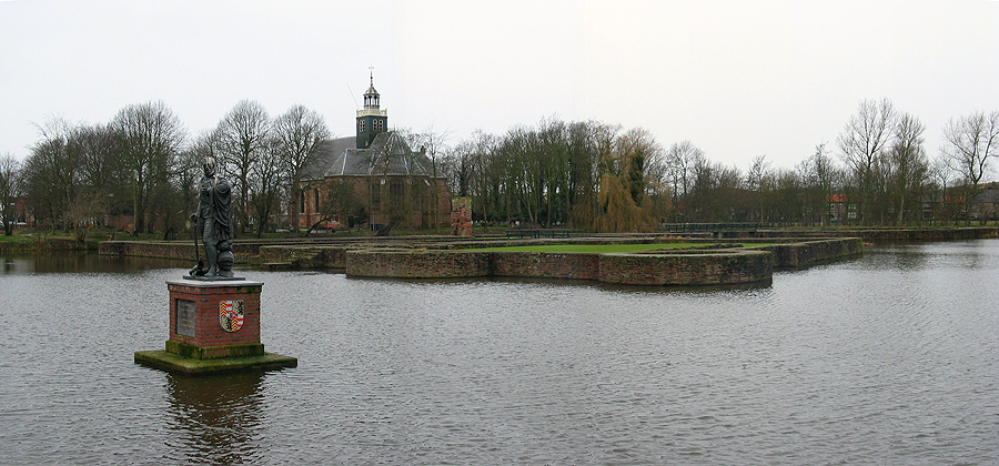 Slot Egmond, Nederlands